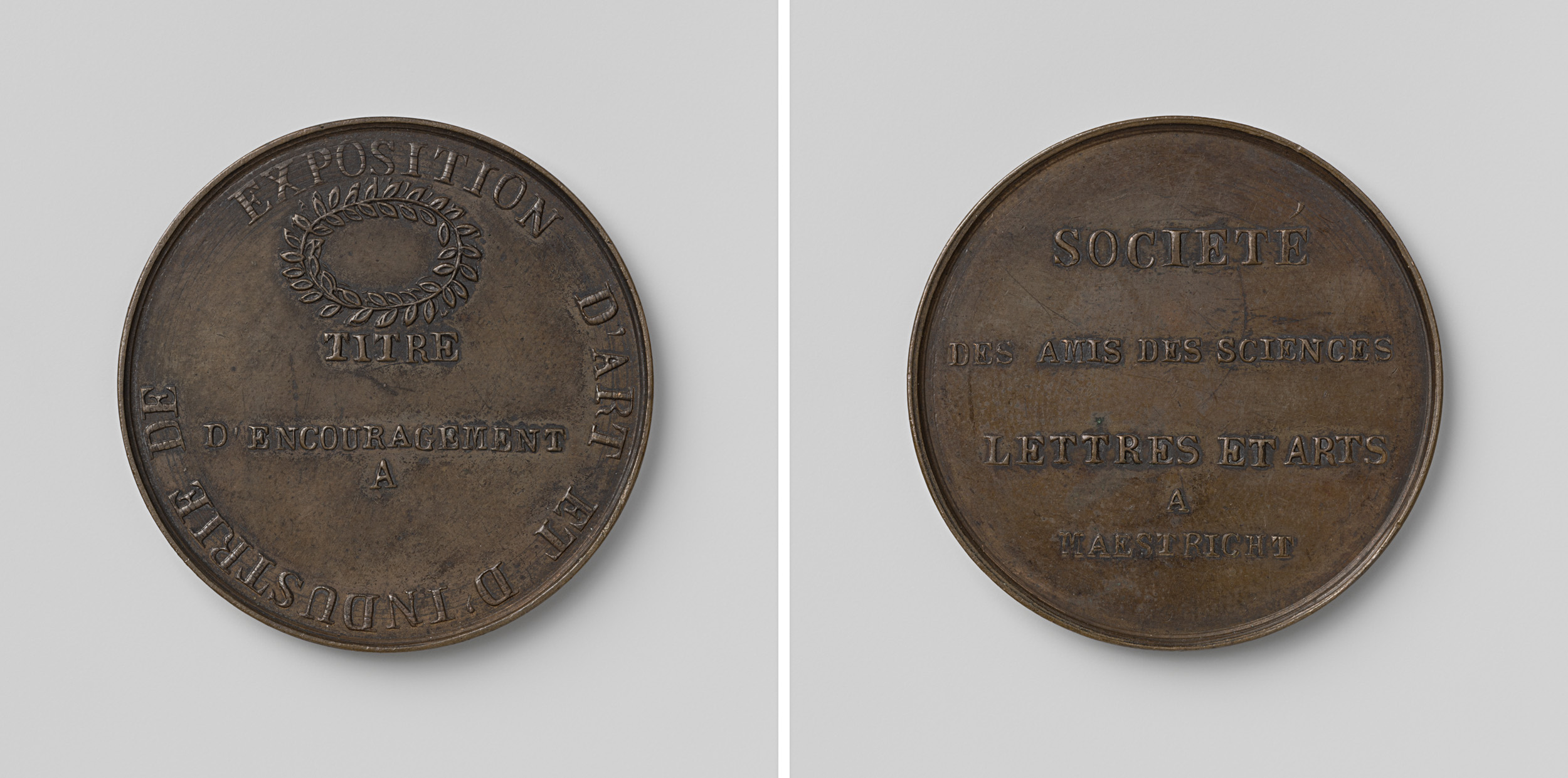 IdentificatieTitel(s): Tentoonstelling van voortbrengselen van kunst en nijverheid te MaastrichtObjecttype: prijspenning Objectnummer: NG-VG-6-19Omschrijving: Bronzen penning. Voorzijde: lauwerkrans boven opschrift binnen omschrift. Keerzijde: opschriftVervaardigingVervaardiger: anoniemPlaats vervaardiging: NederlandDatering: 1834Materiaal: brons Techniek: slaanAfmetingen: d 3,8 cm. × g 21,52 grOnderwerpWanneer: 1834 - 1834Waar: MaastrichtVerwerving en rechtenCredit line: Schenking van mevrouw J.M. van Gelder-NijhoffVerwerving: schenking 1885Copyright: Publiek domein